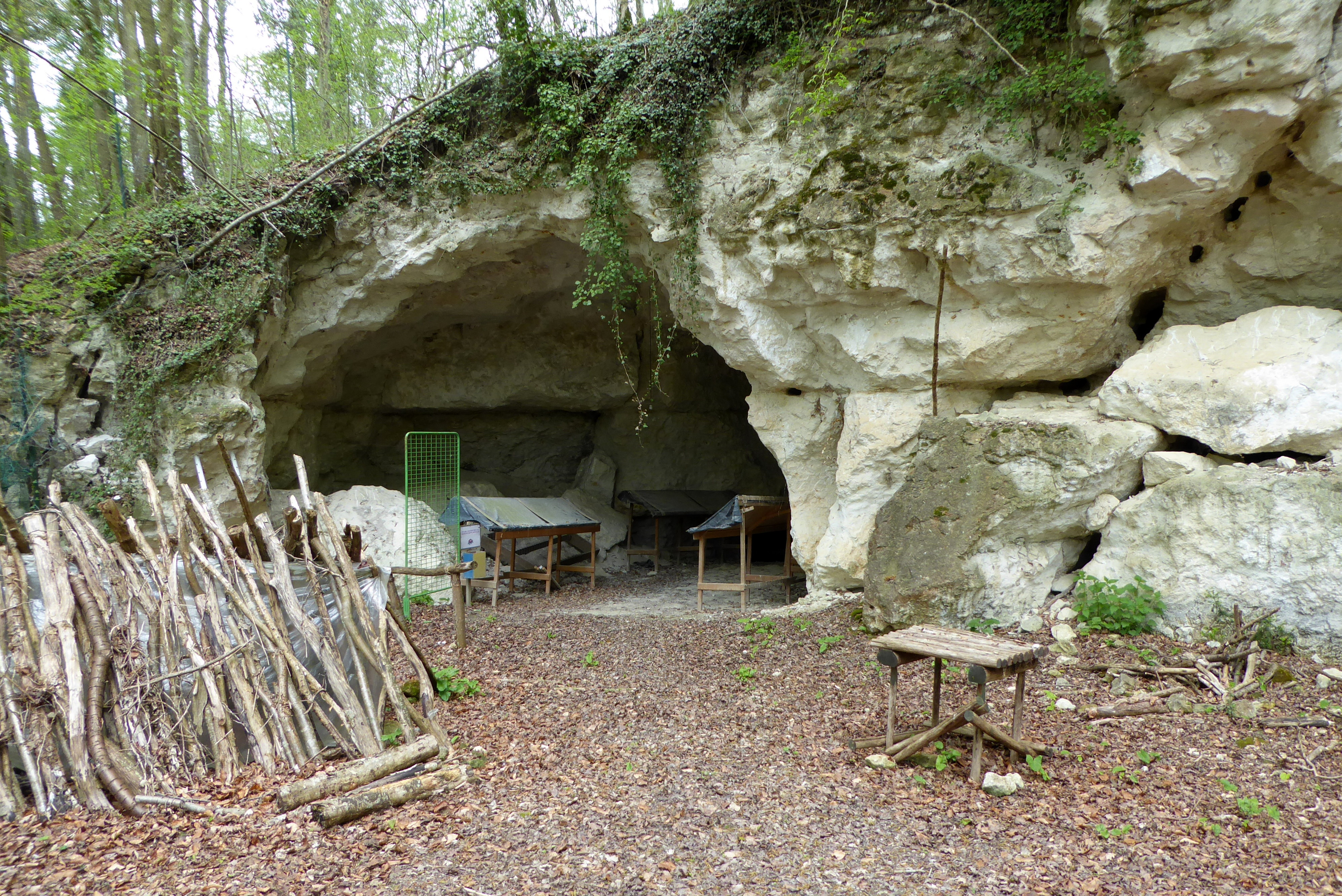 grotte du maquis de Plainville, Marolles-les-Buis, Eure-et-Loir, France.